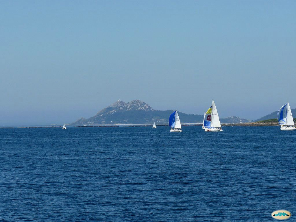 Ría de Vigo